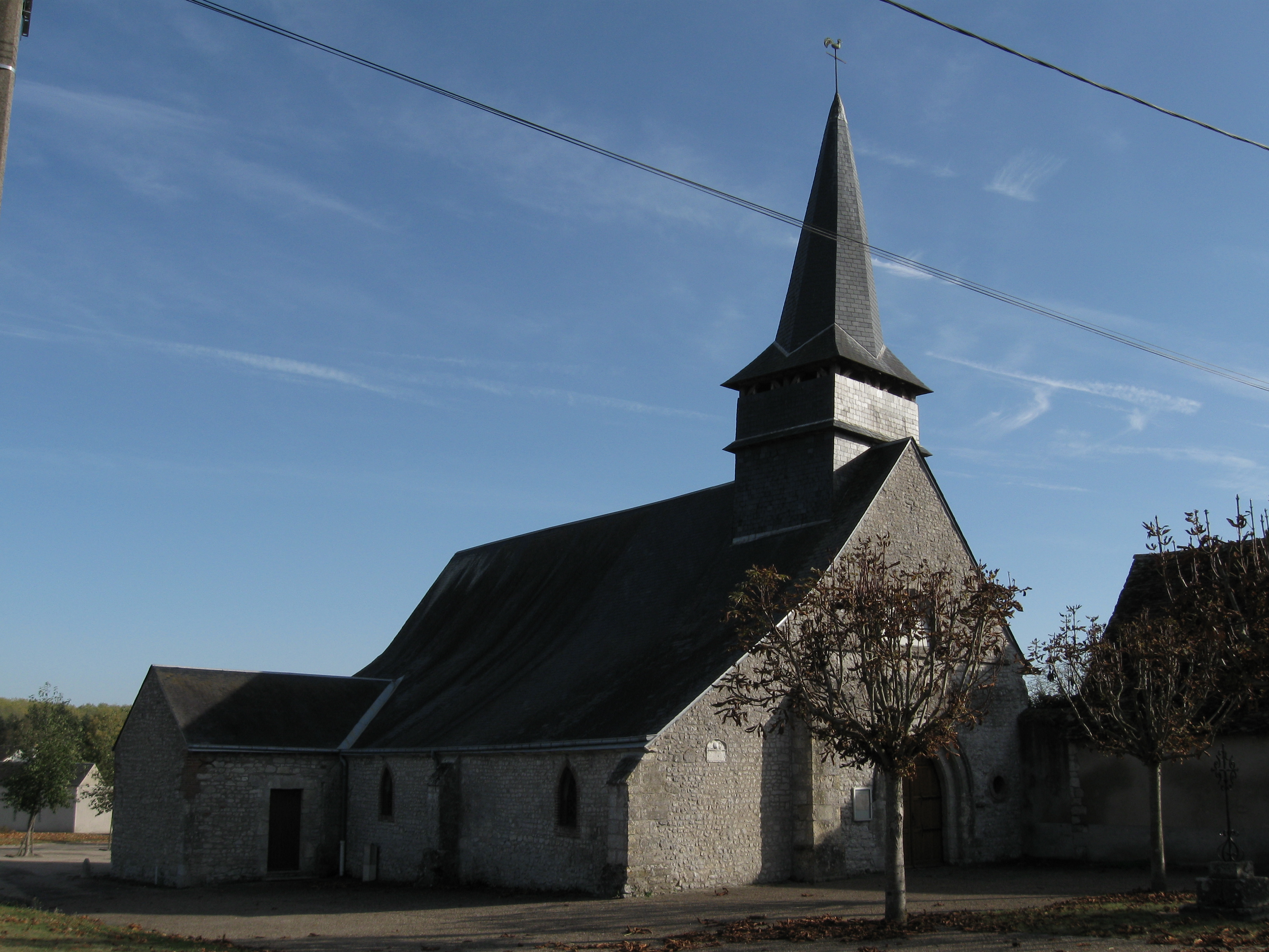 Église Saint-Pierre-ès-Liens, Boigny-sur-Bionne, Loiret, France